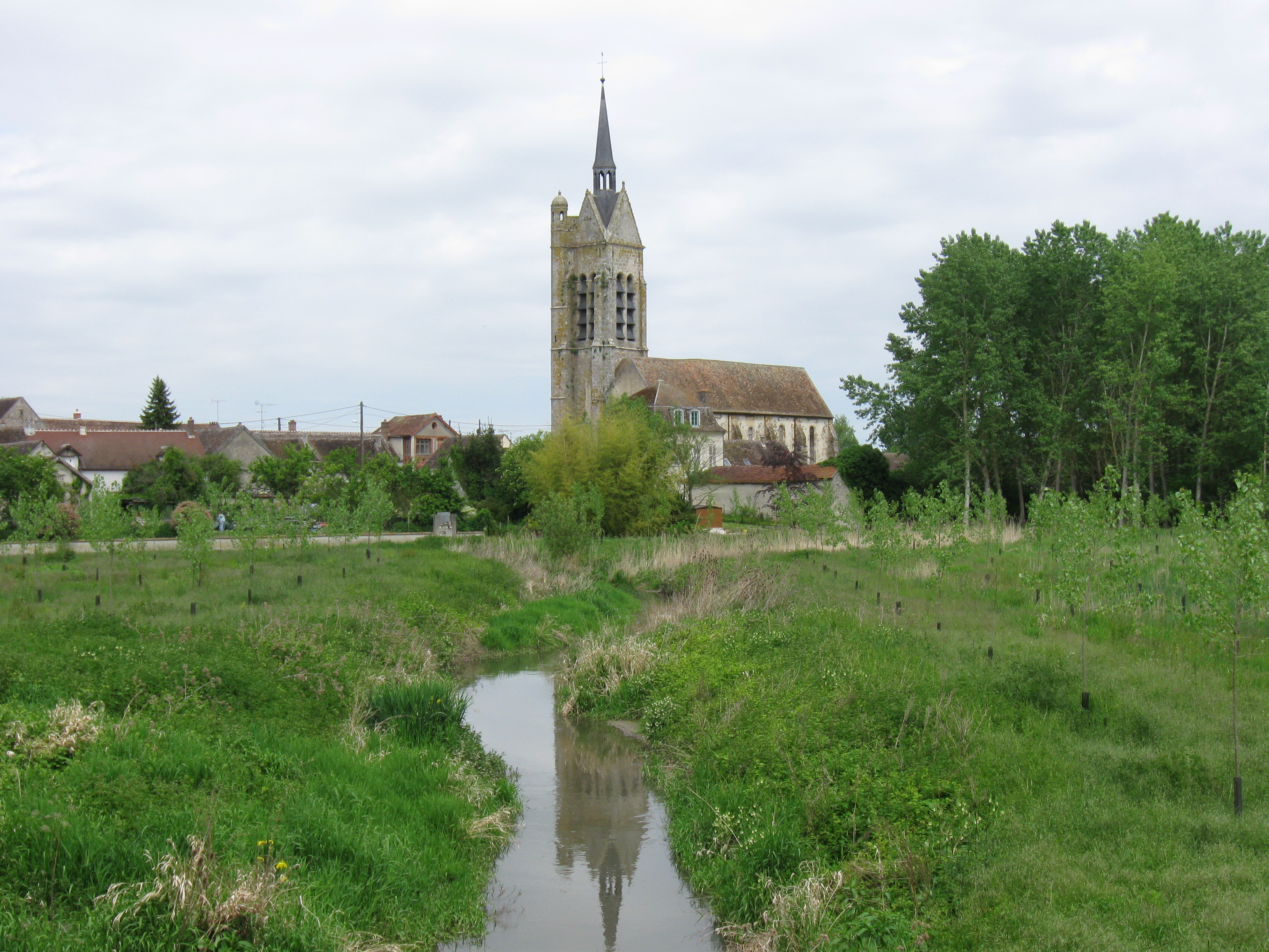 L'Auxence et l'èglise Saint-Cyr de Vimpelles. (Seine-et-Marne, région Île-de-France).